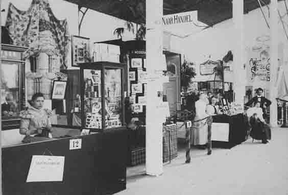 Sigarenmaakster op de Nationale Tentoonstelling van Vrouwenarbeid 9 juli - 21 september 1898 in Den Haag.